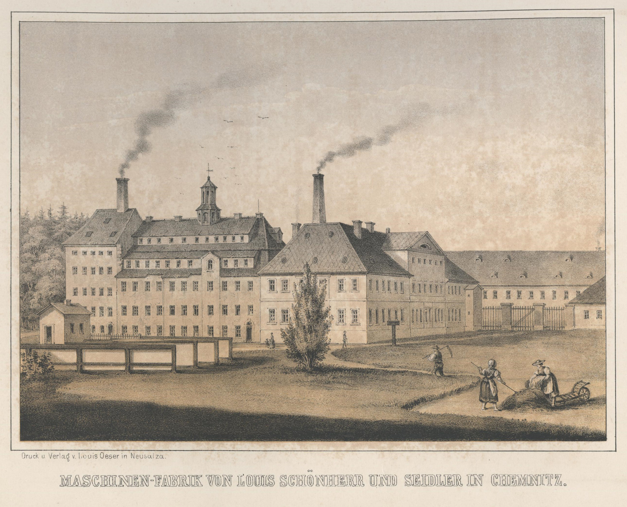 Maschinen-Fabrik von Louis Schönherr und Seidler in Chemnitz aus: Album der Sächsischen Industrie Erster Band